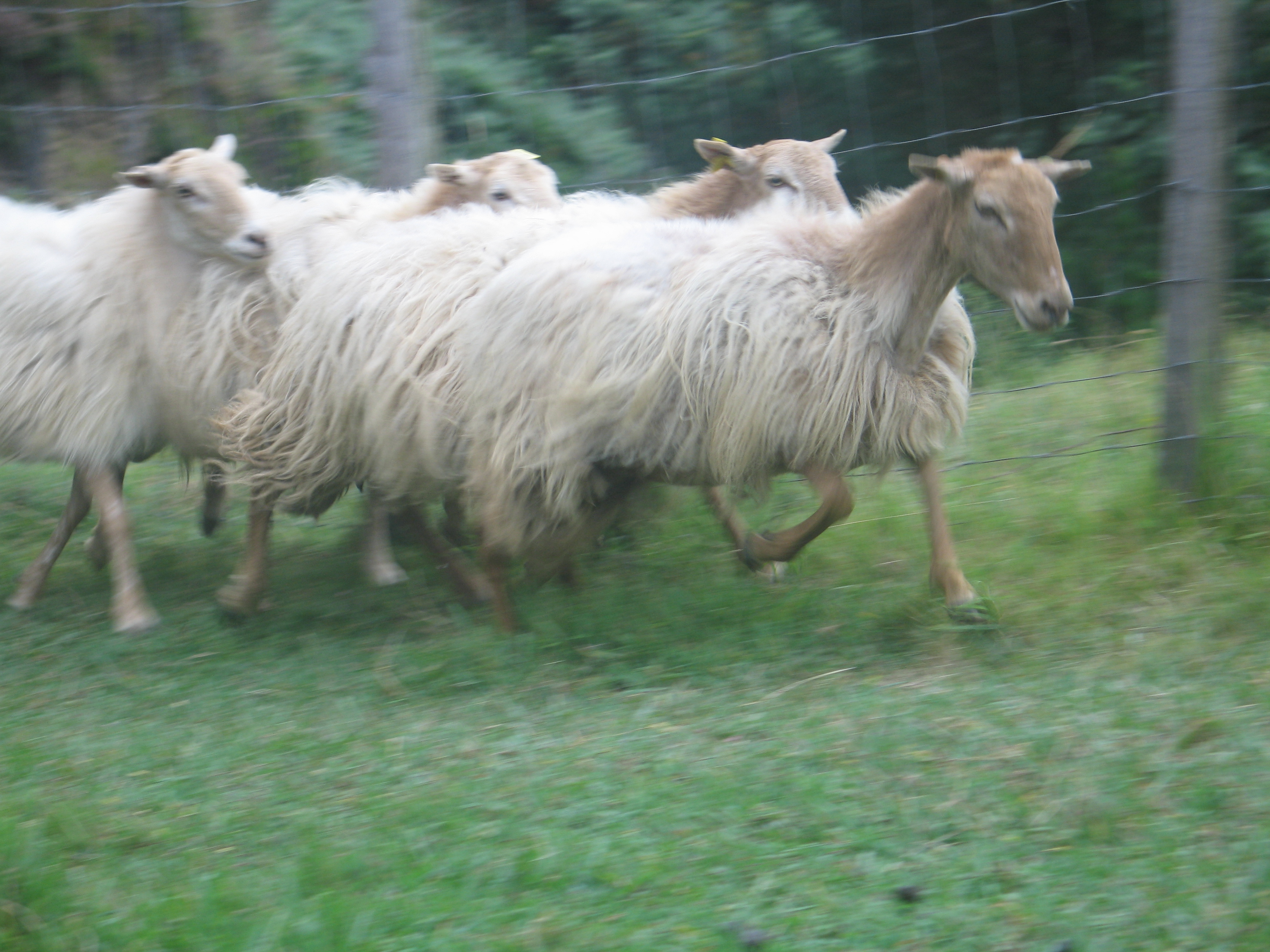 Sasardiak korrika.